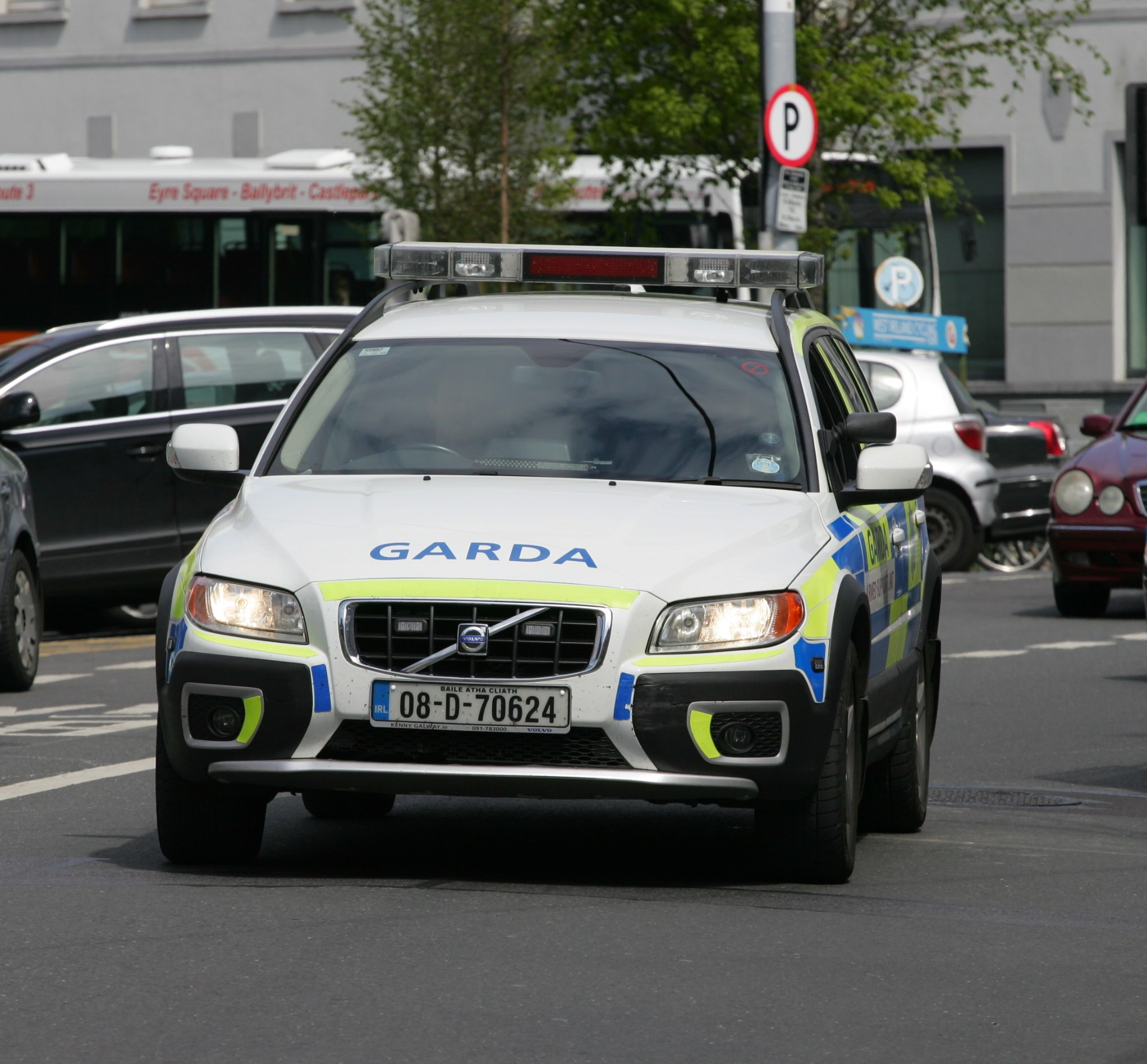 Garda Volvo regional support unit